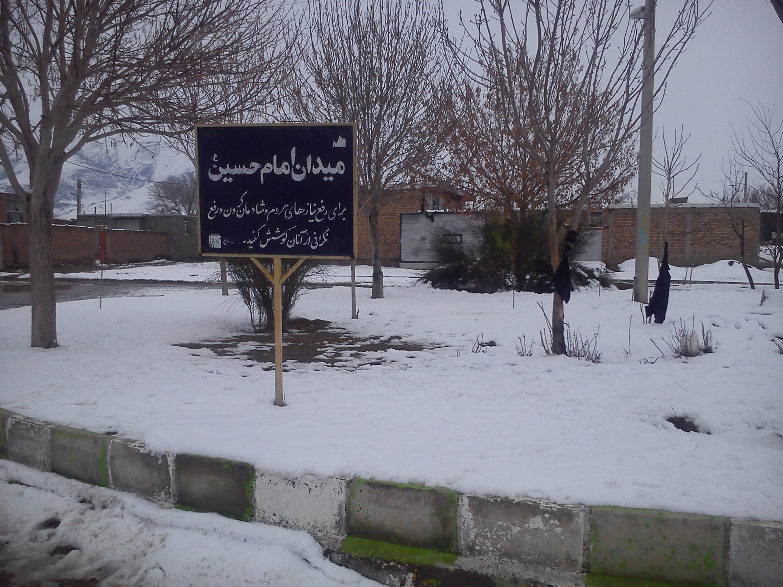 میدان اصلی ورودی روستا از سمت غرب.این میدان محل توقف تاکسی ها و ماشین های مسافربری به سمت کنگاور است.